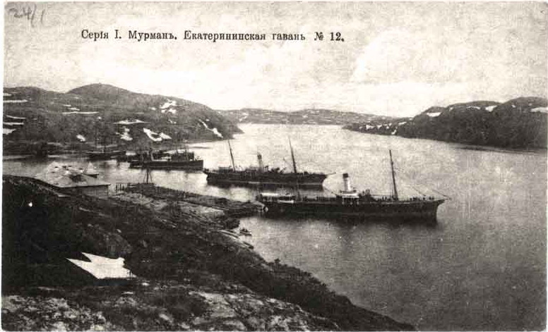 Екатерининская гавань. № 12